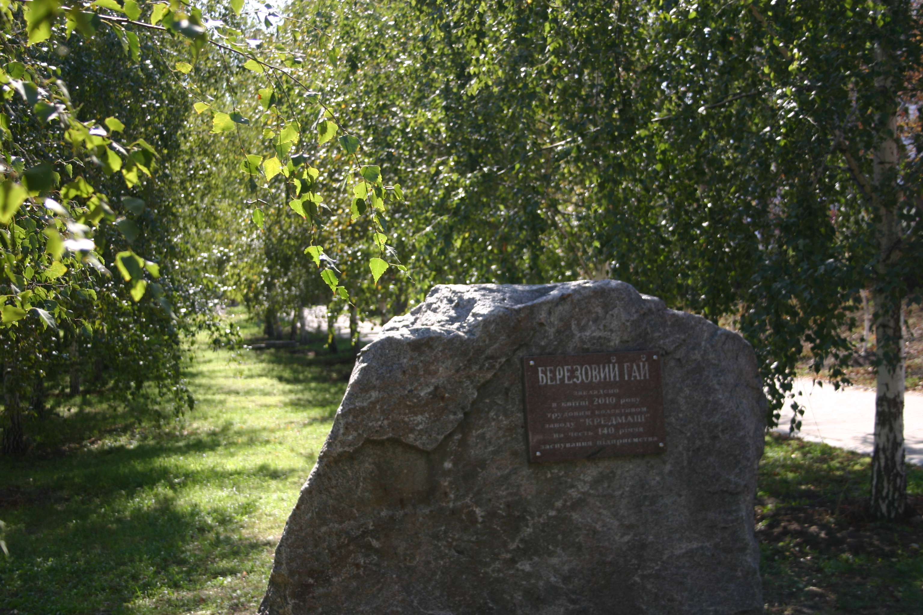 Берёзовая роща в парке МЮДа города Кременчуг (Украина)